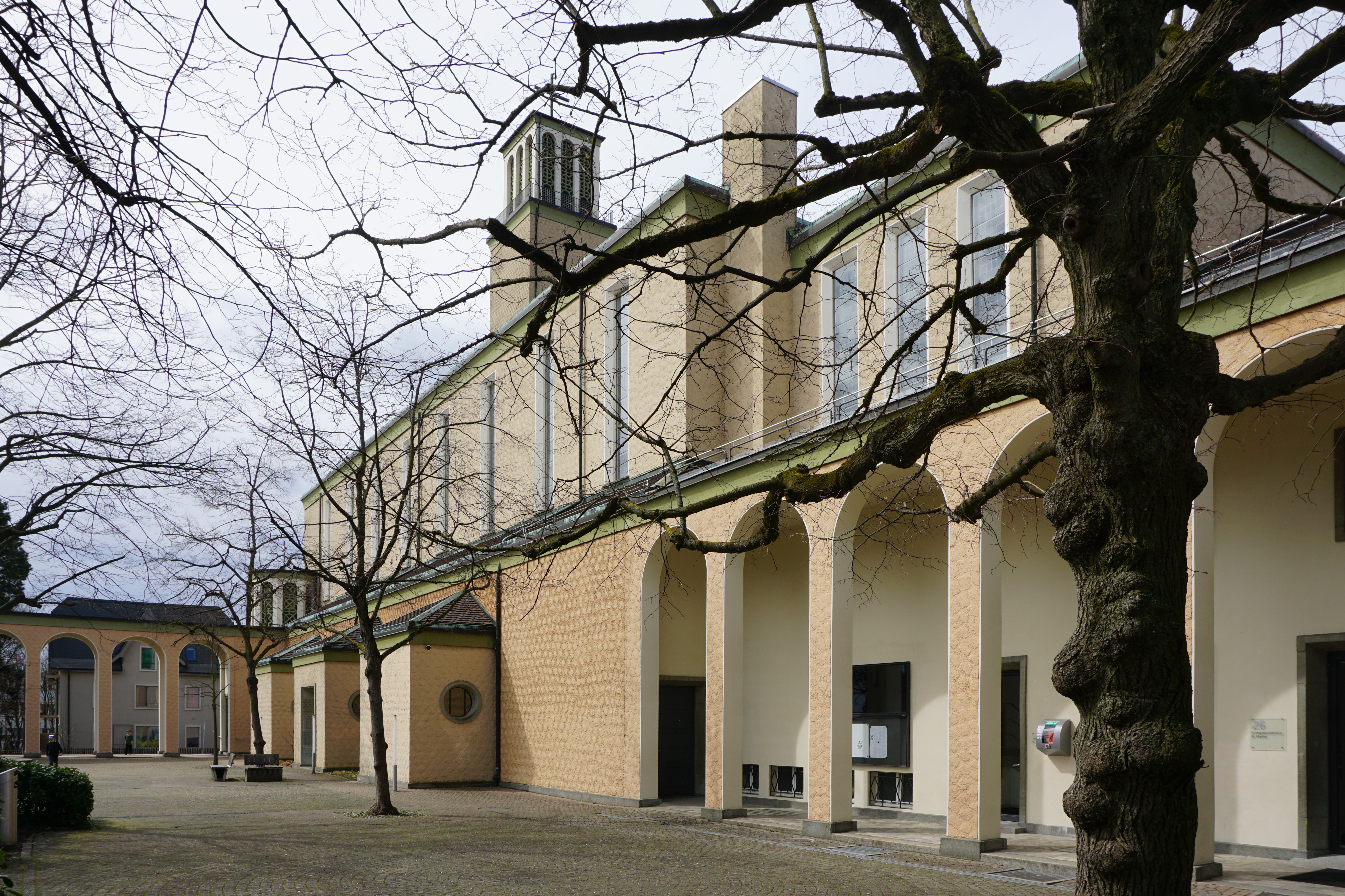 Marienkirche, Südseiteseite von Südost